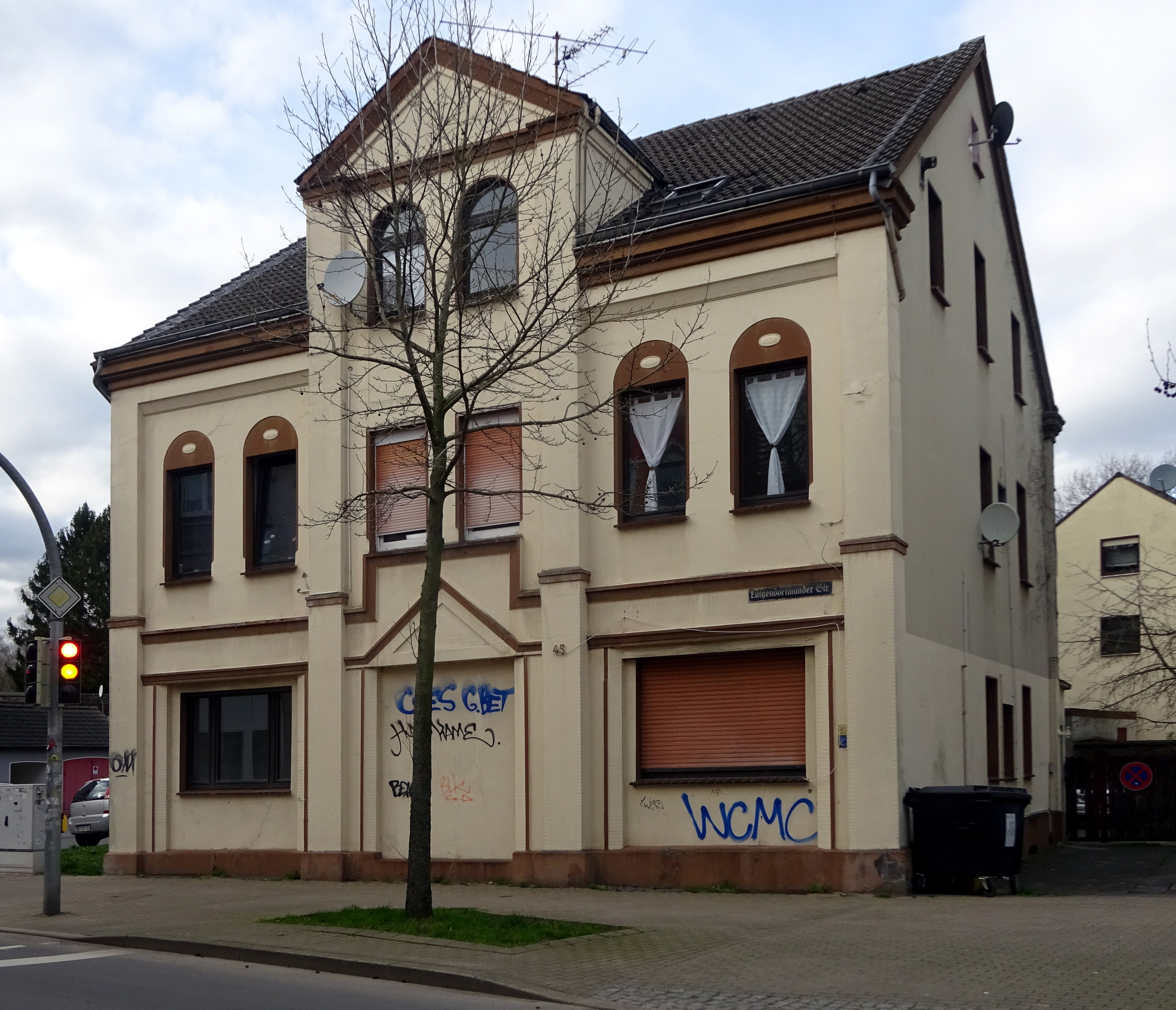 Haus Lütgendortmunder Str. 45 in Dortmund